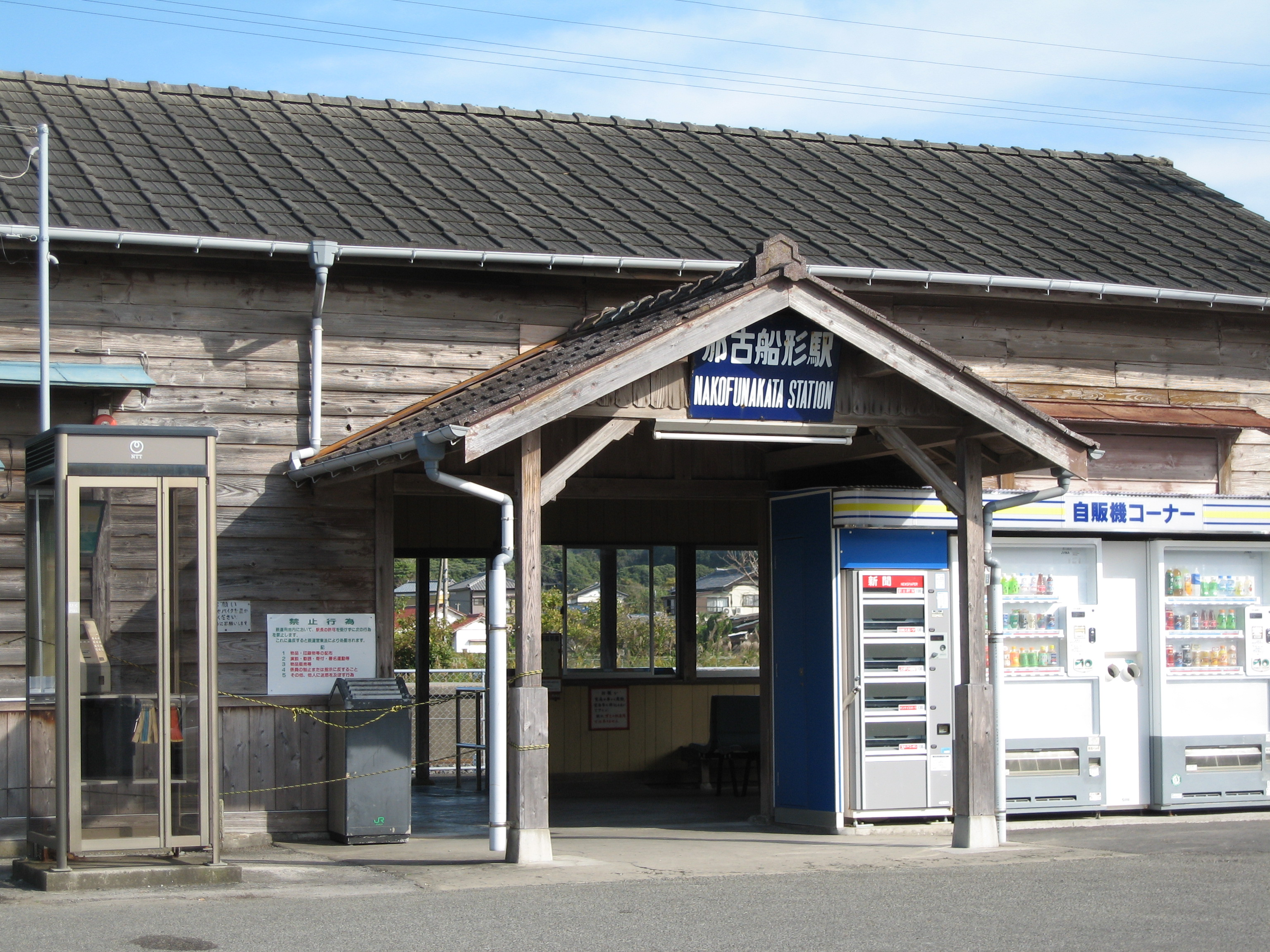 Nakofunakata station, Uchibo Line, Chiba, Japan, 那古船形駅